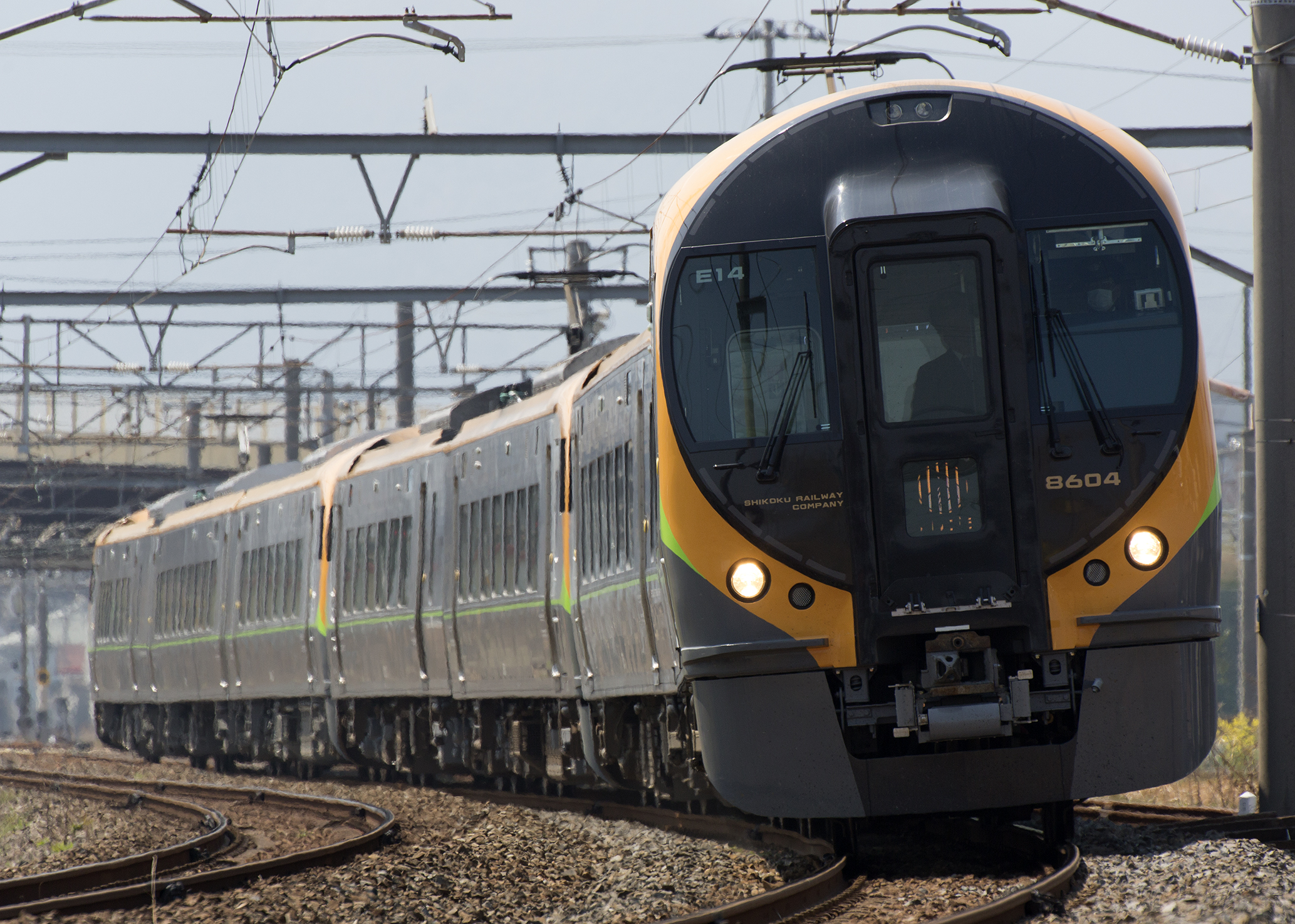 JR四国 8600系特急型電車 いしづち しおかぜ